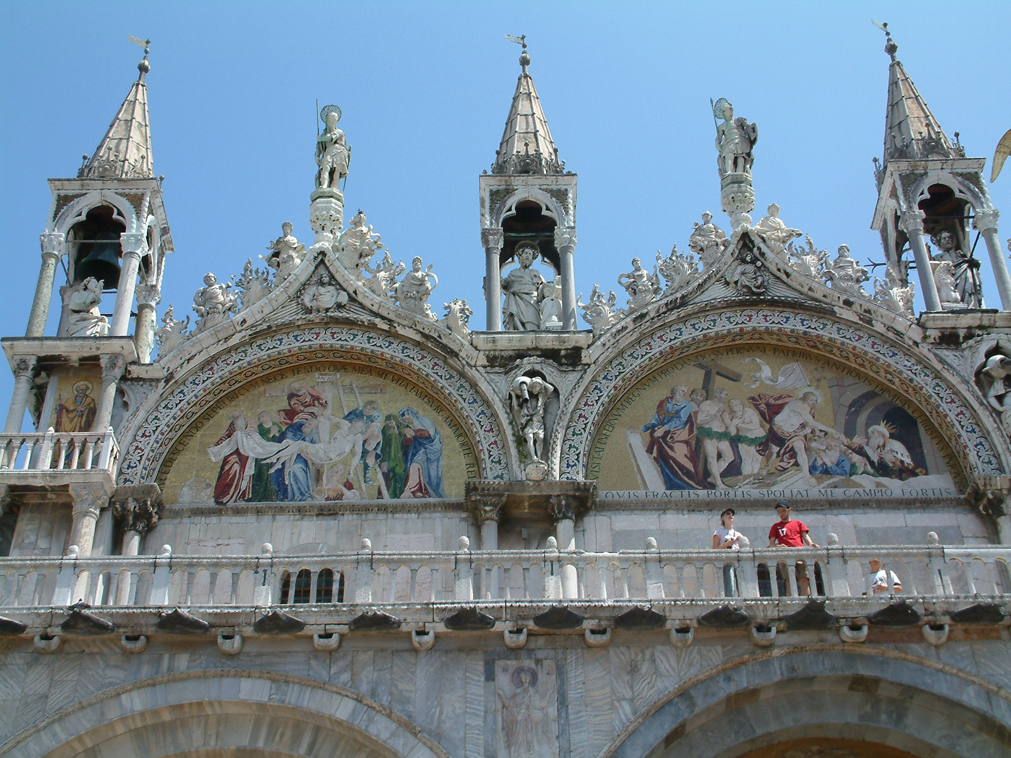 Venice, detail.